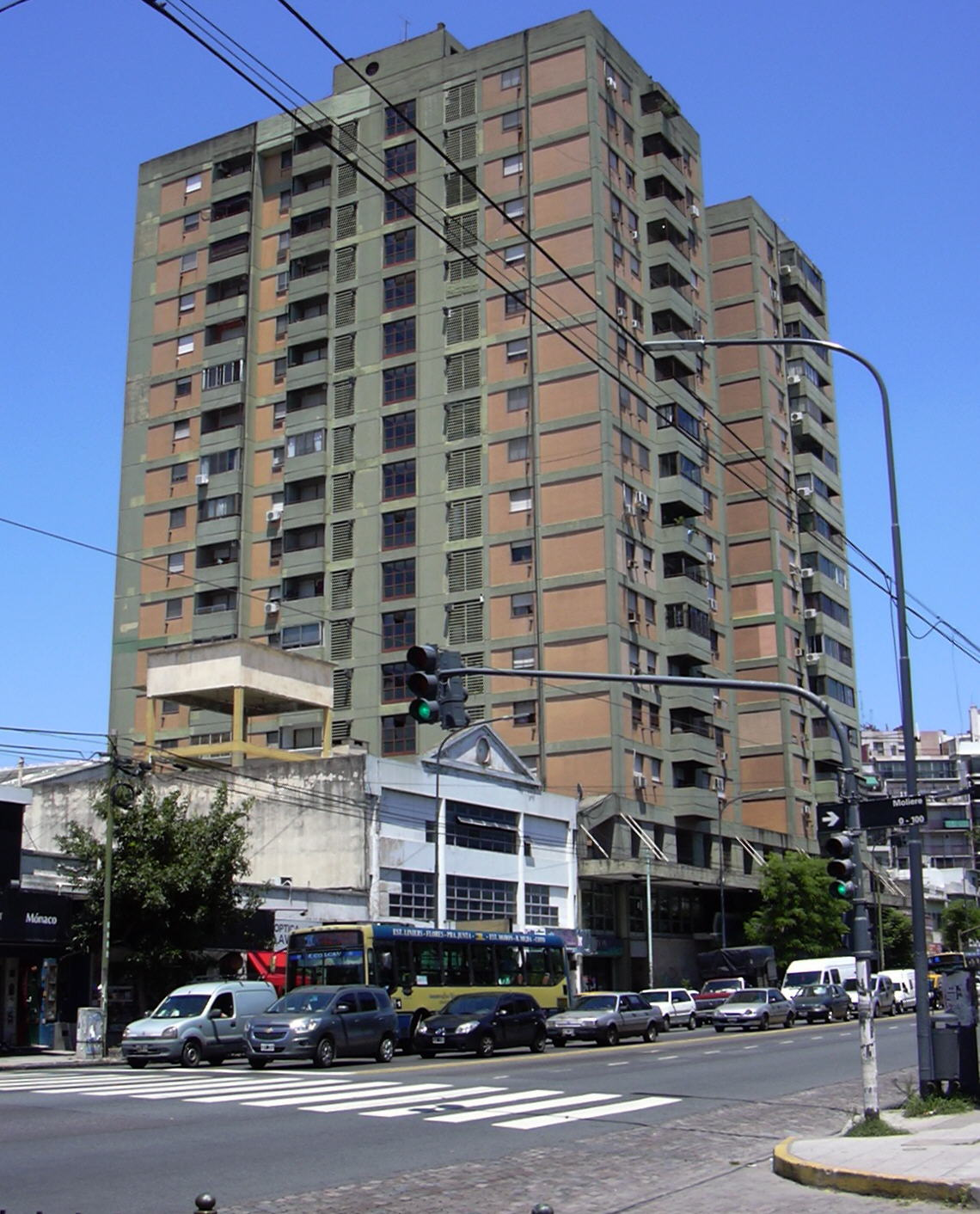 Edificio "Juan José Díaz Arana": situado en Av. Rivadavia 9844/9858 (Villa Luro), constuido por la cooperativa El Hogar Obrero en 1981.